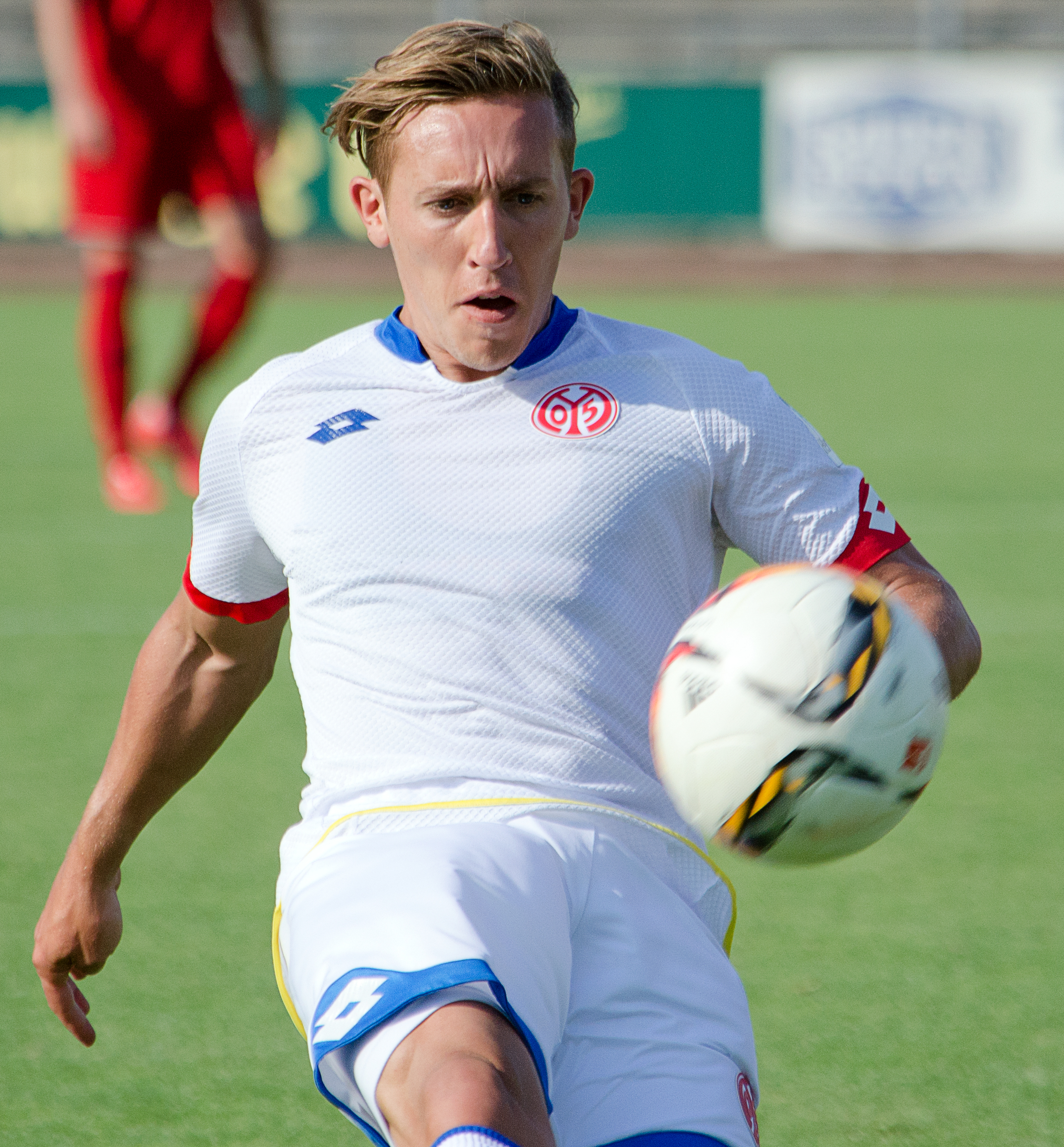 Pablo de Blasis, argentinischer Fußballspieler